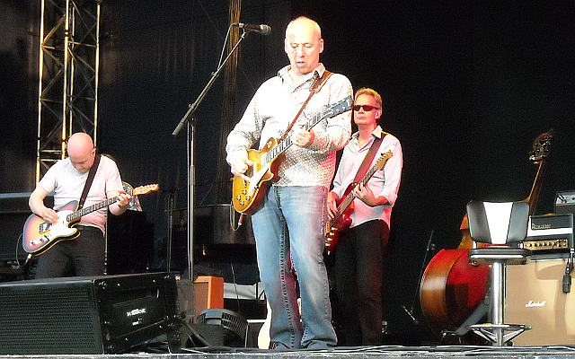 Mark Knopfler, with John McCusker and Glenn Worf, live in Dresden 04. Juli 2013